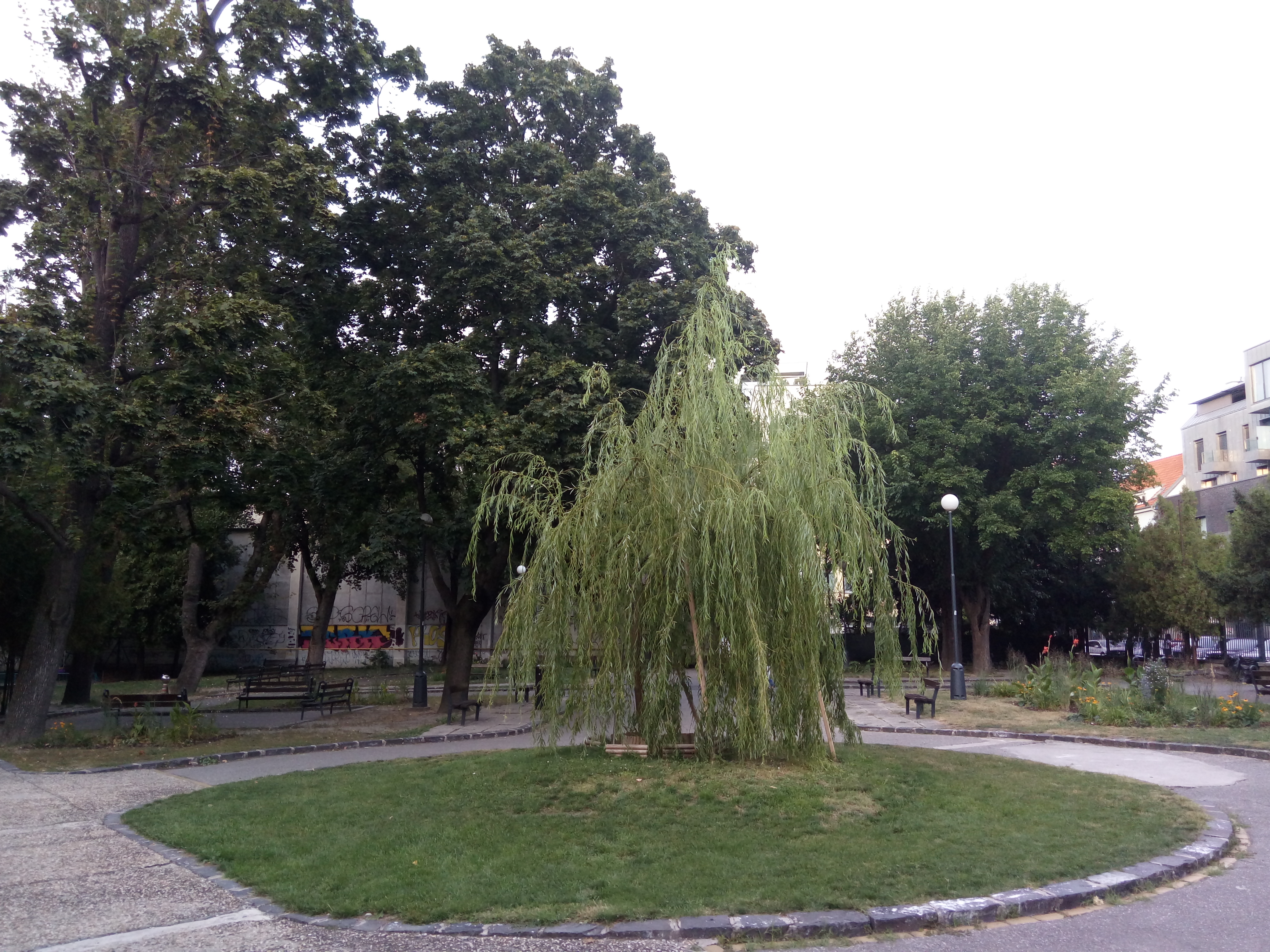 Vešeléniho záhrada, Dunajská, Staré Mesto, Bratislava